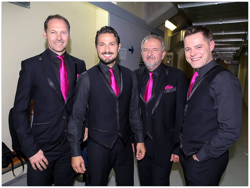 Čuki na Noči Modrijanov 2013.